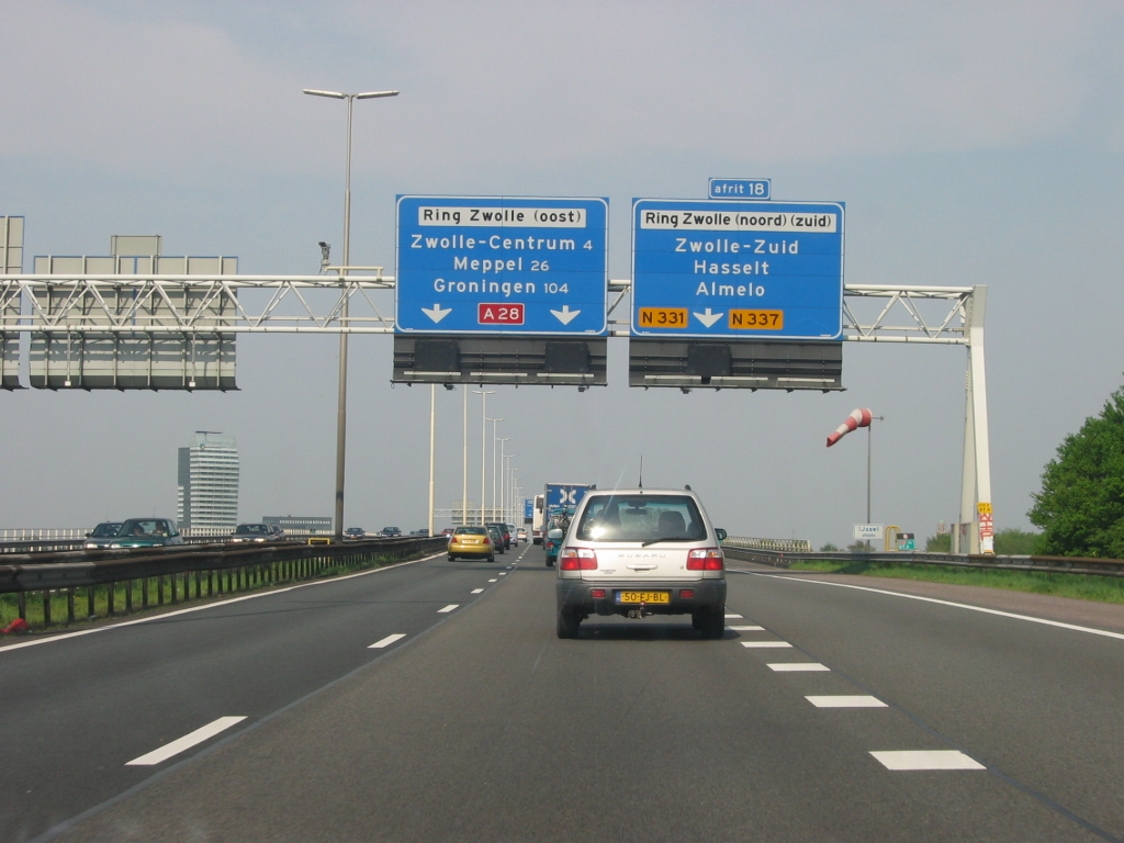 De A28 - Nieuwe IJsselbrug bij Zwolle